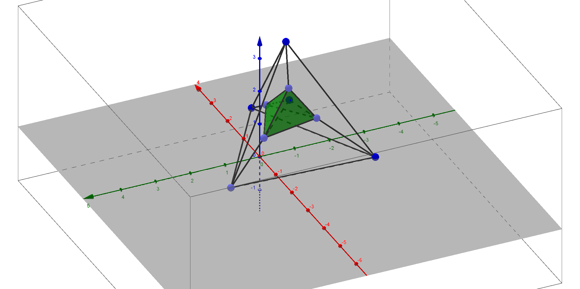 Сечение пентахорона тетраэдром в центральной проекции (выполнено в программе GeoGebra)